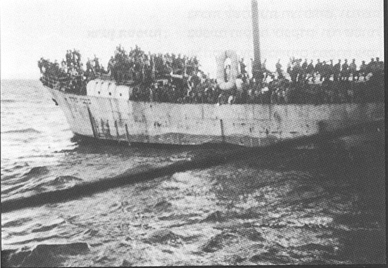 אוניית המעפילים ברכה פולד